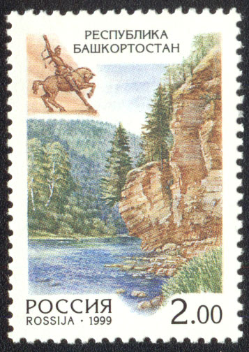 Почтовая марка России - Салават Юлаев, символ Башкирии